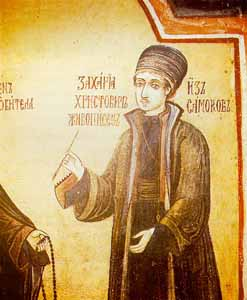 Zaharii_Zograf_Self-portrait.jpeg